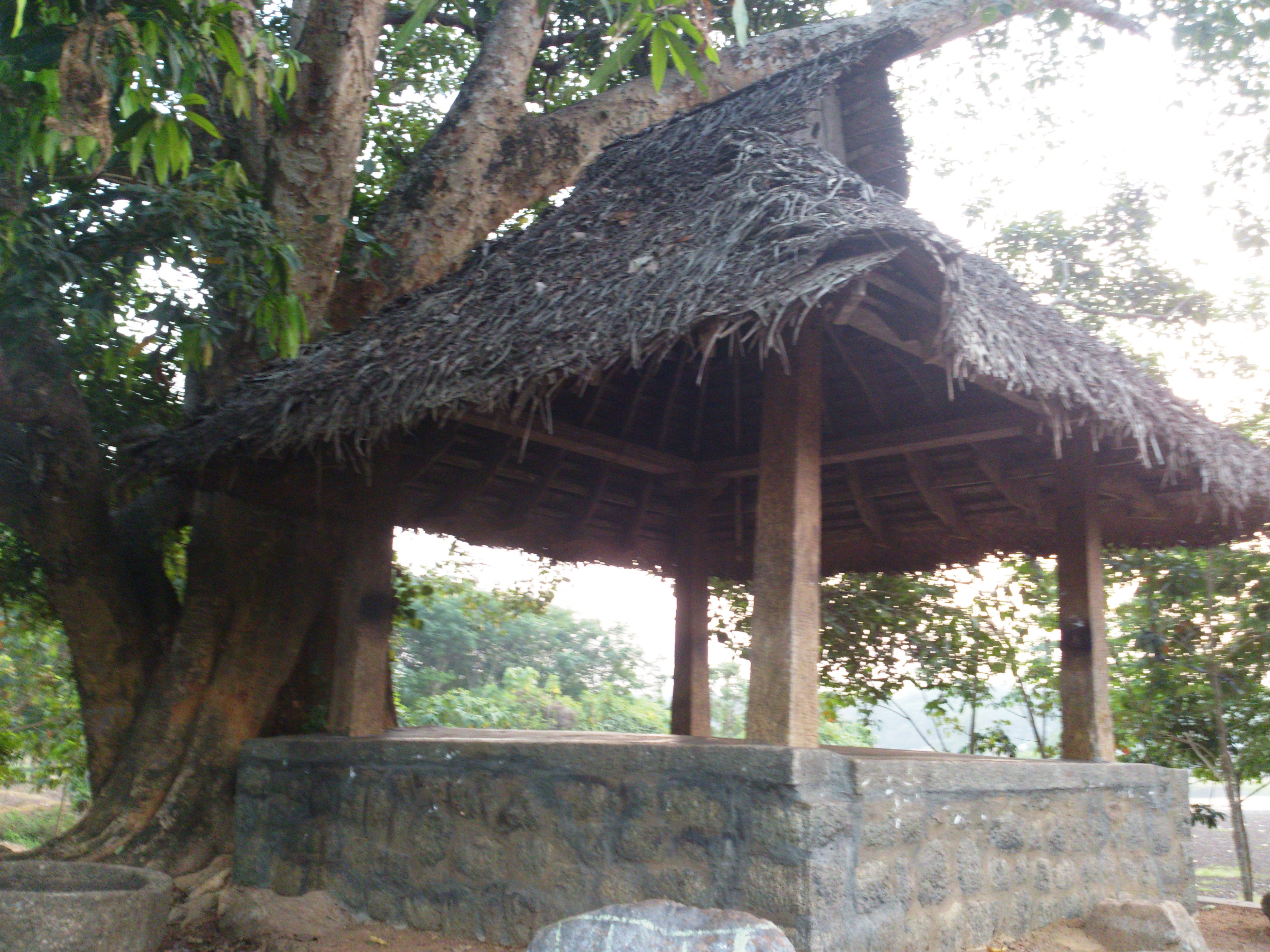 ആറ്റുവാശ്ശേരിയിലെ കളത്തട്ട്.